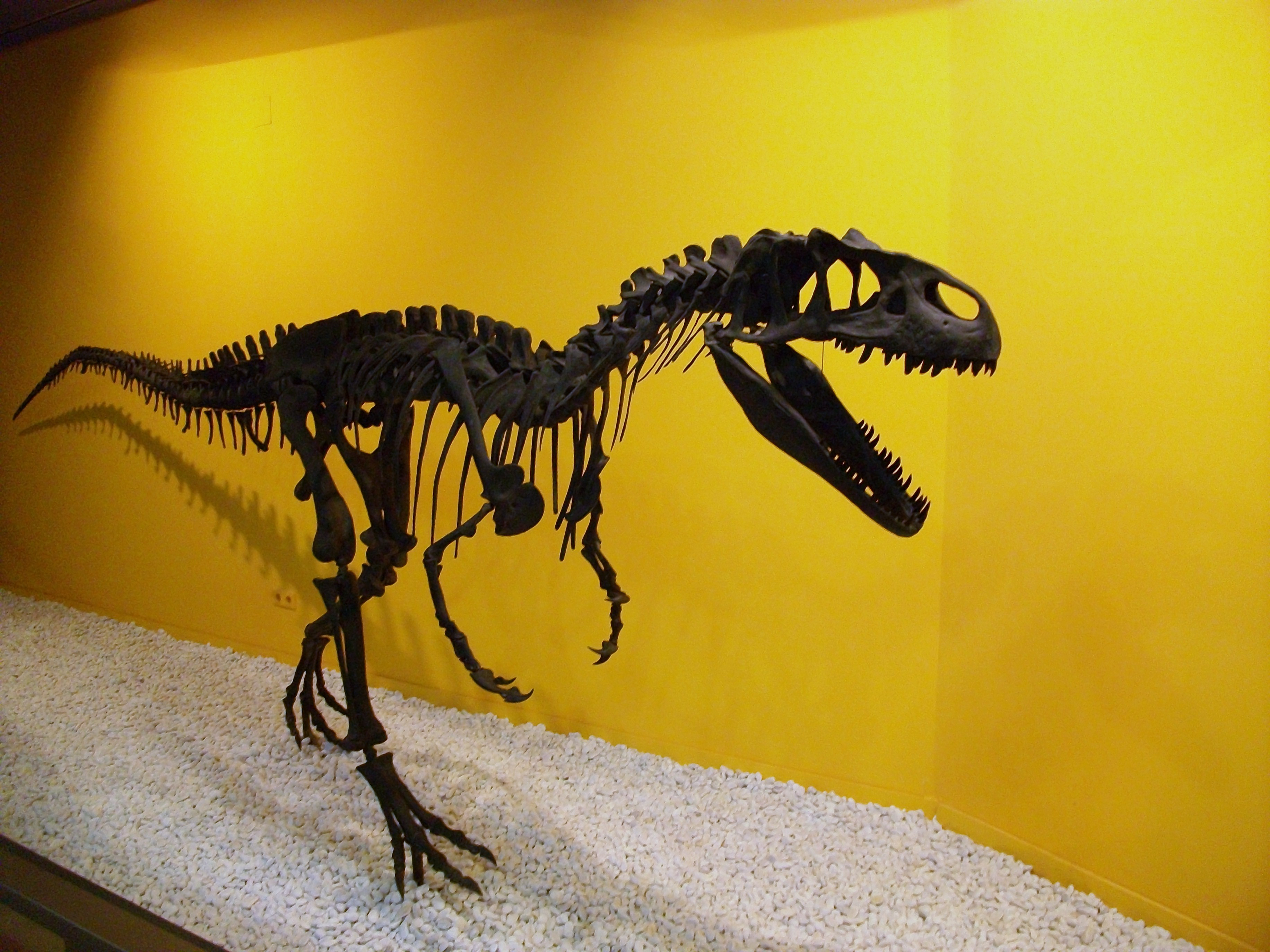 Al·losaure (Allosaurus fragilis), Museu de Ciències Naturals de València.